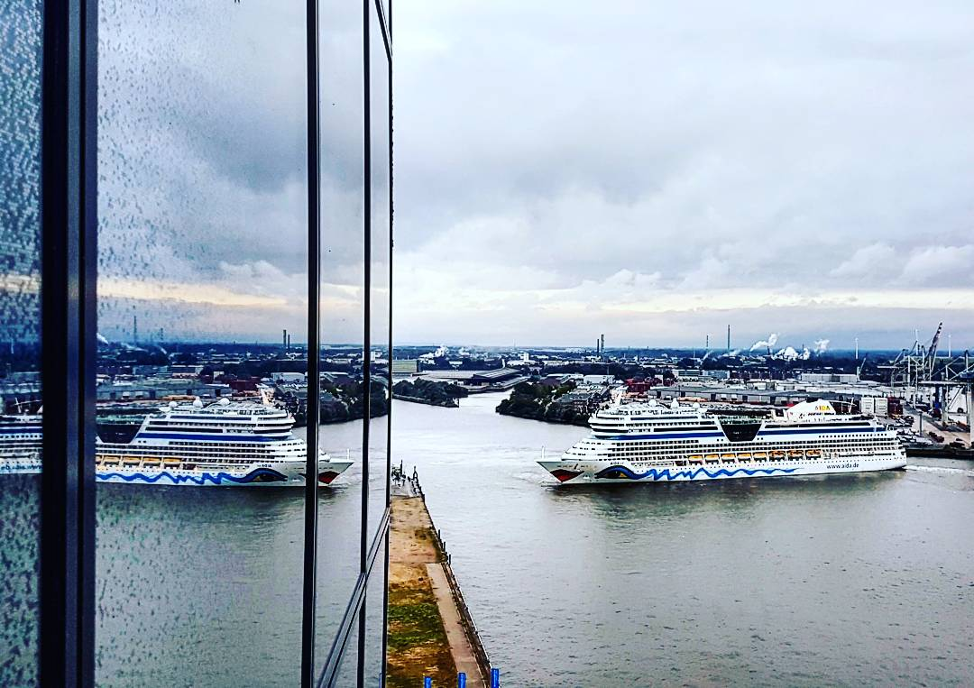 Aus den Zimmern & Suiten des Westin Hamburgs öffnet sich ein besonderer Ausblick über den Hafen Hamburgs und die HafenCity.